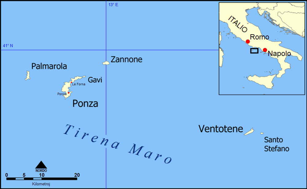 Mapo de la Ponza Insularo. Kreita surbaze de :Dosiero:Pontine Islands map.png, kiu havas licencon GFDL.